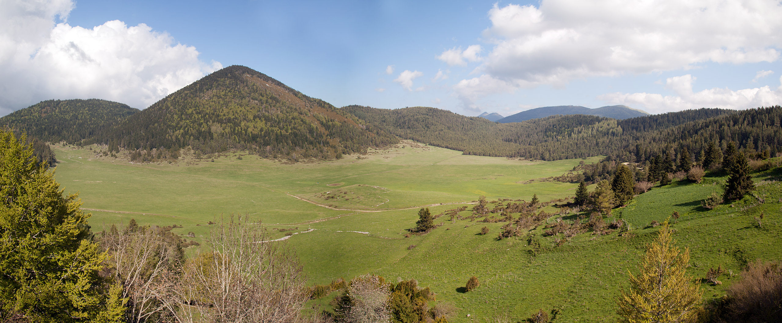 Comus Pla du Boume